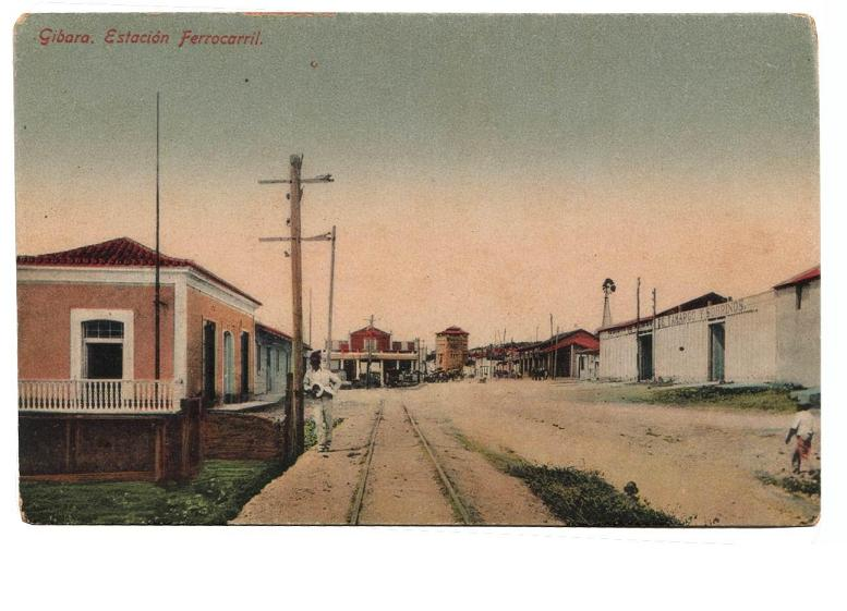 Al fondo - Estación del ferrocarril Gibara-Holguín en Gibara